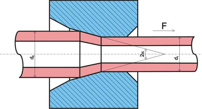 wire drawing